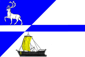 Флаг города Дудинки